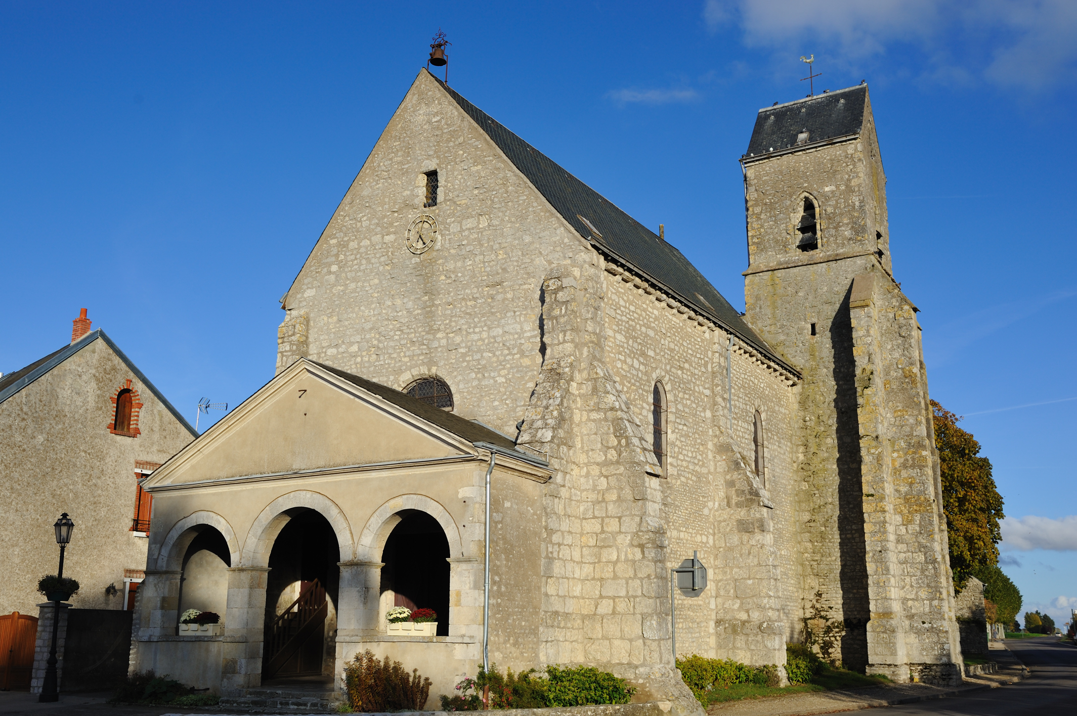 Église Saint-Laurent, Outarville, Loiret, France